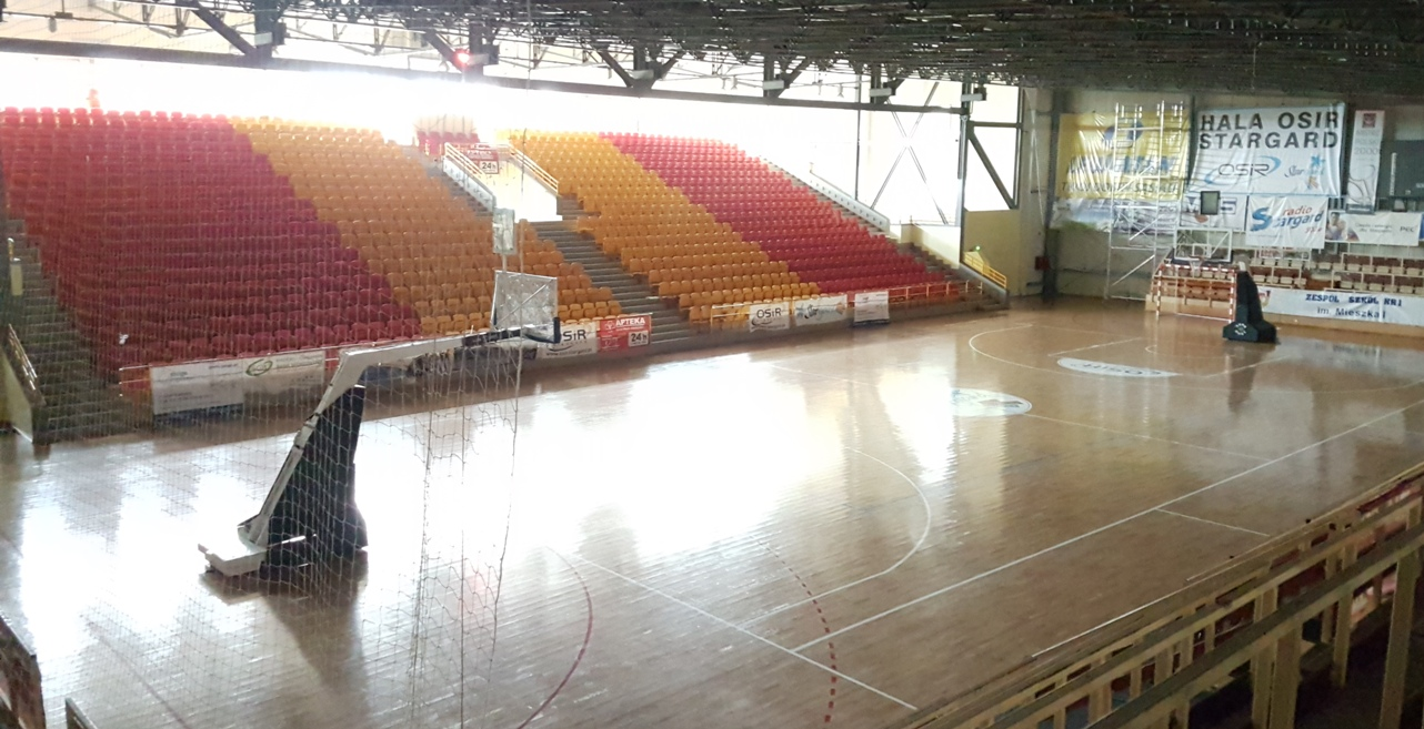 Stargard, 05.05.2017r. Hala sportowa OSiR, widok na nową trybunę